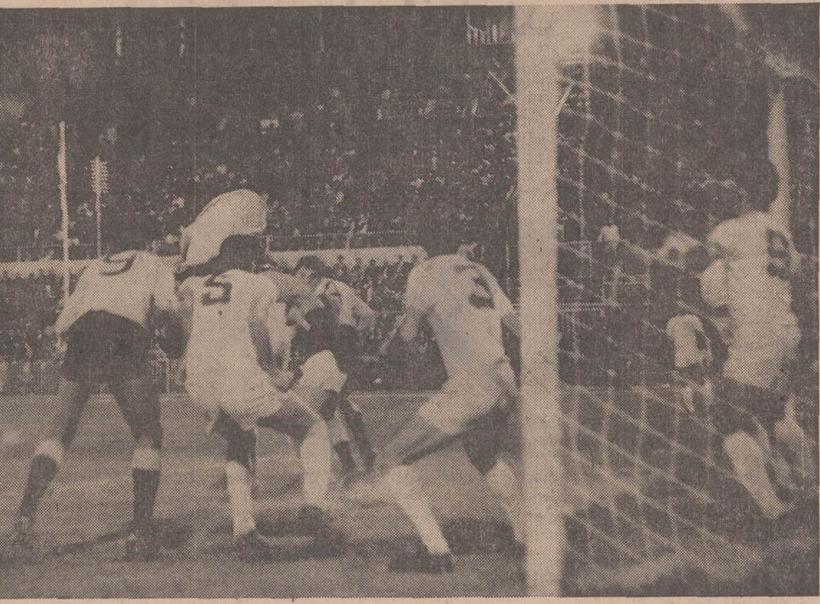 تصویری از گل اول استقلال در فینال جام باشگاههای آسیا توسط غلام وفاخواه در دقیقه ۸۳